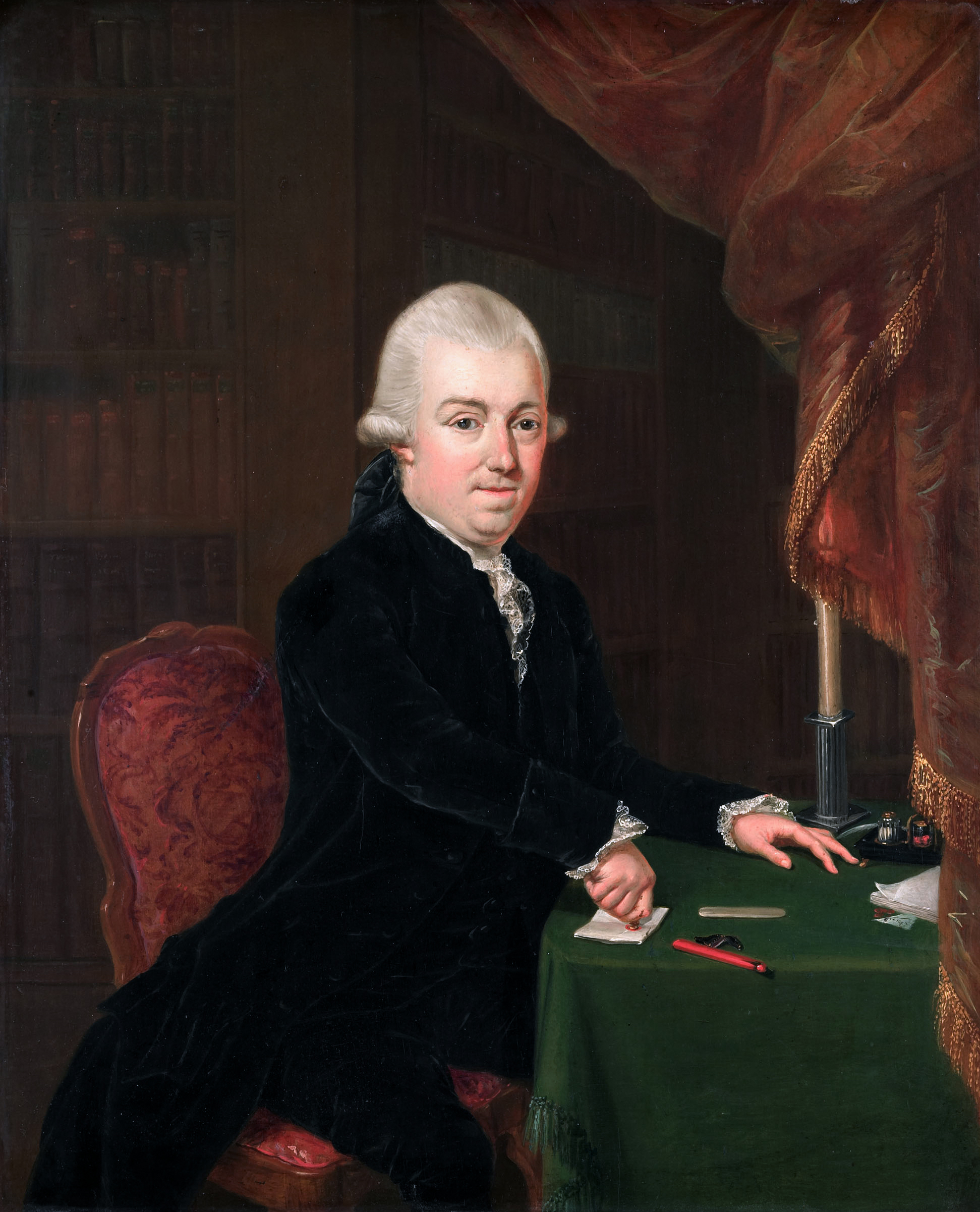 schilderij; portret; portret Amsterdam; mansportret; Bicker, Jan Bernd (1746-1812)